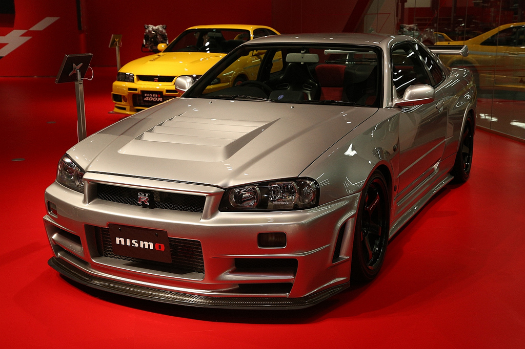 Nissan Skyline GT-R Nismo Z-Tune в выставочном зале Nismo